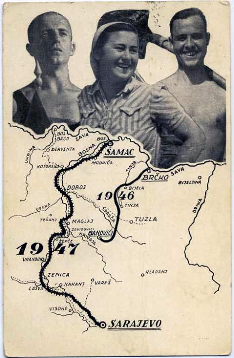 Српски (ћирилица): Плакат са изградње пруге Шамац-Сарајево